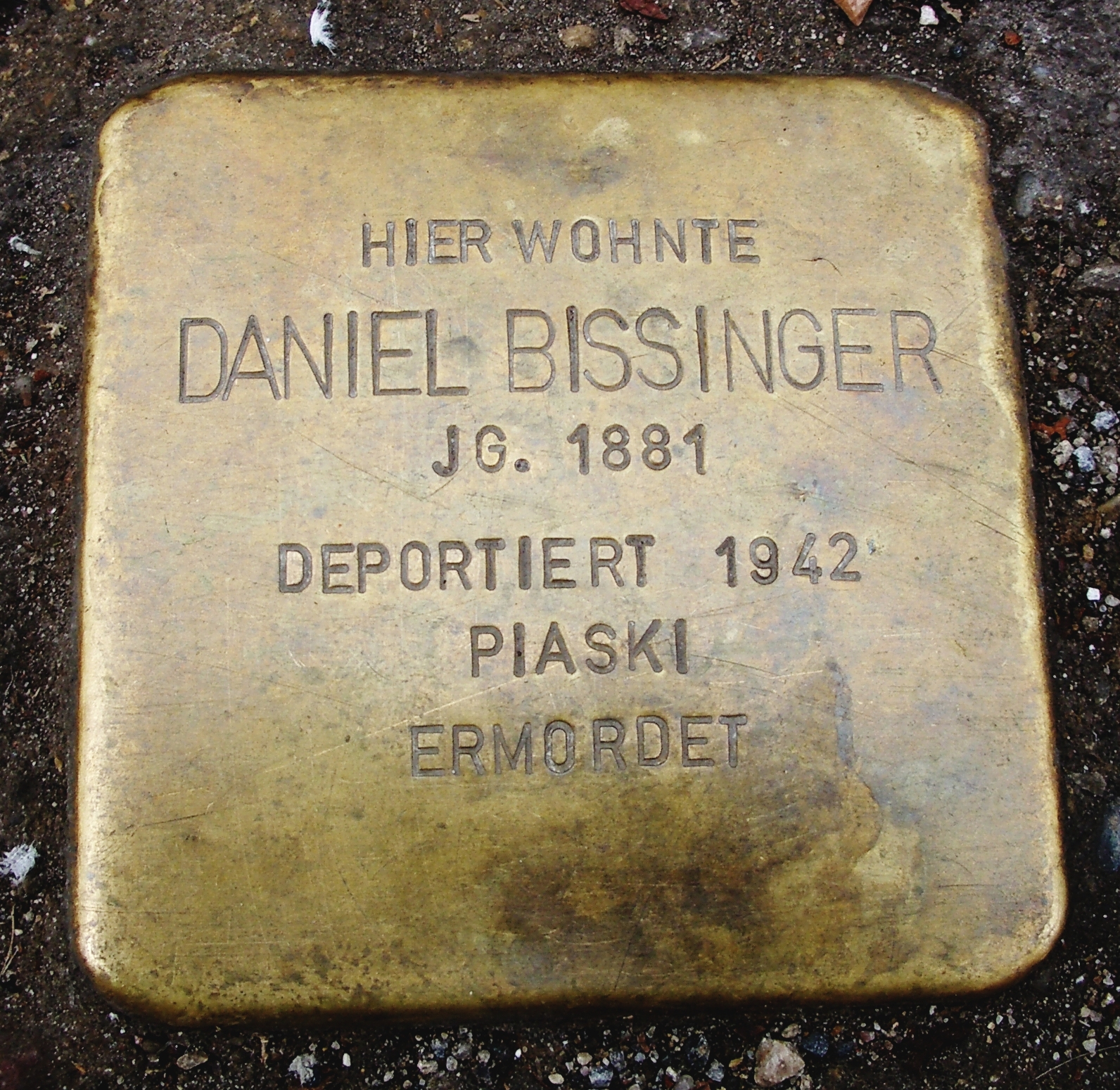 Der Stolperstein für Daniel Bissinger befindet sich in der Augsburger Straße 34 in Neu-Ulm, Bayern.